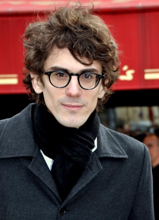 Hugo Gélin au déjeuner des nommés des César du cinéma